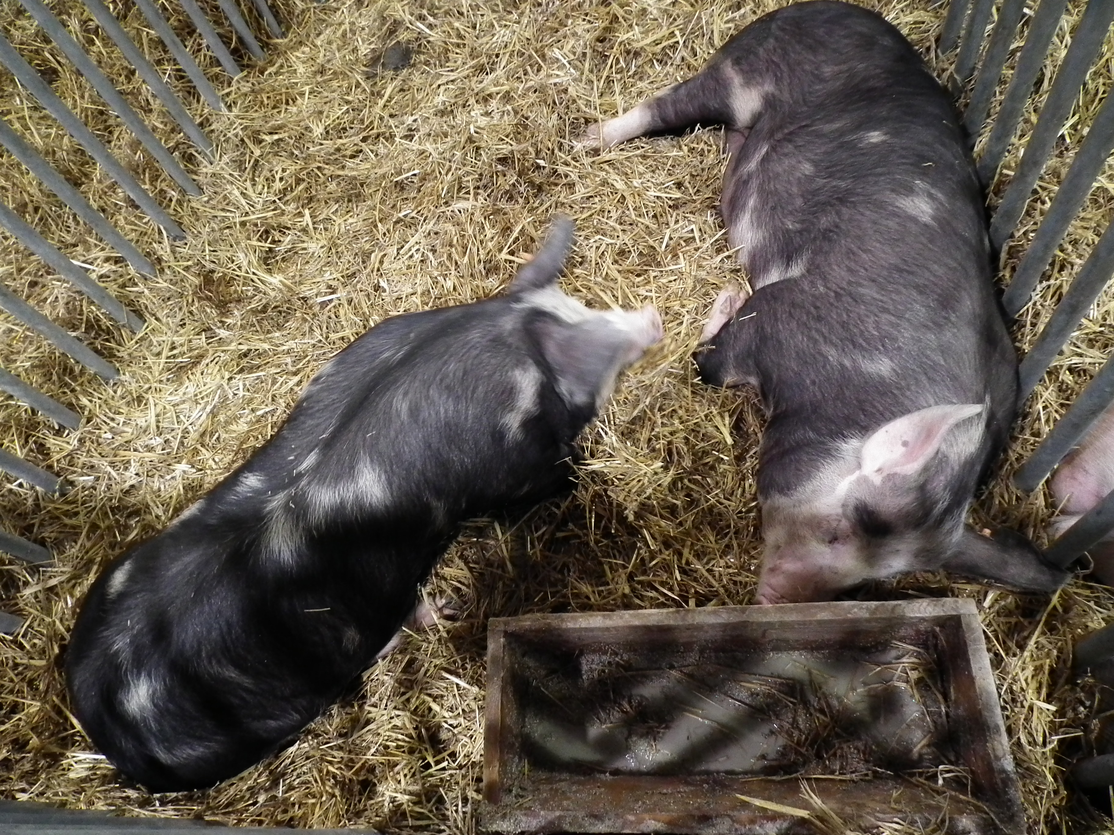 Świnie rasy puławskiej.